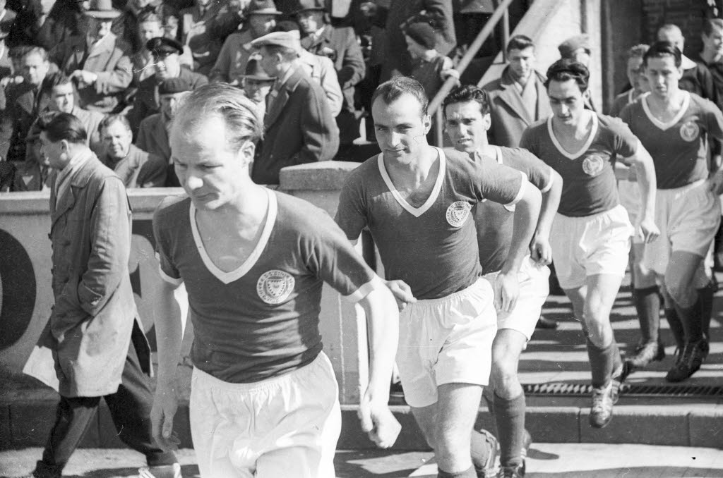 im Holsteinstadion. Im Bild u.a. Holsteins Hans-Peter Ehlers (2.v.l.) und Alfred Bornemann (3.v.l.).